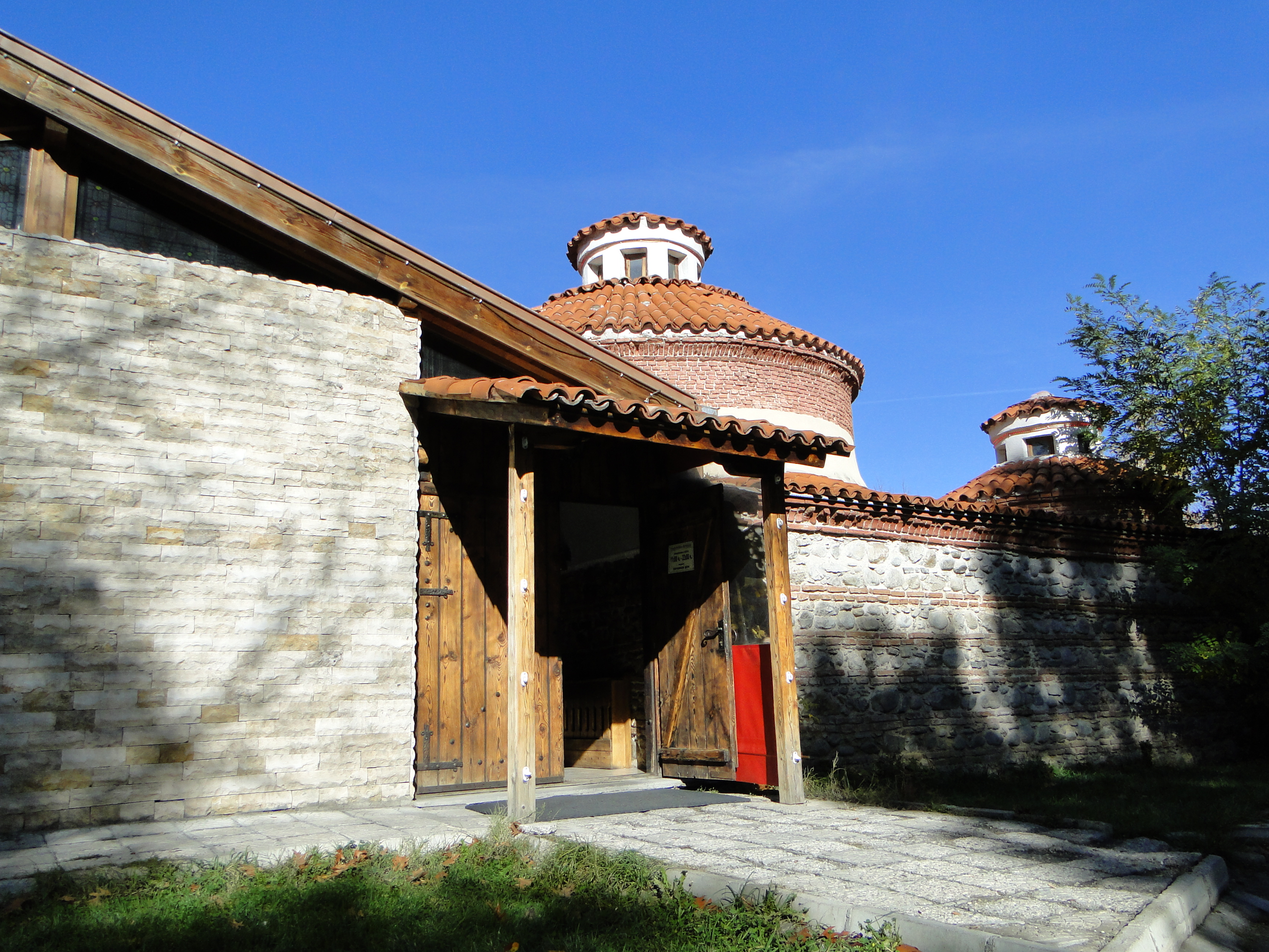 Разлог 2012 November